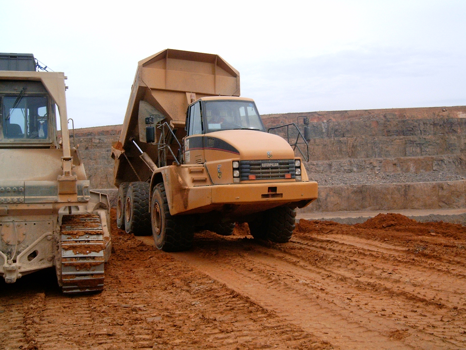 Photo d'un dumper caterpillar 740 en train de vider. Photo personnelle, donc, pas de problèmes de licence. Utilisateur:Torché Waremme